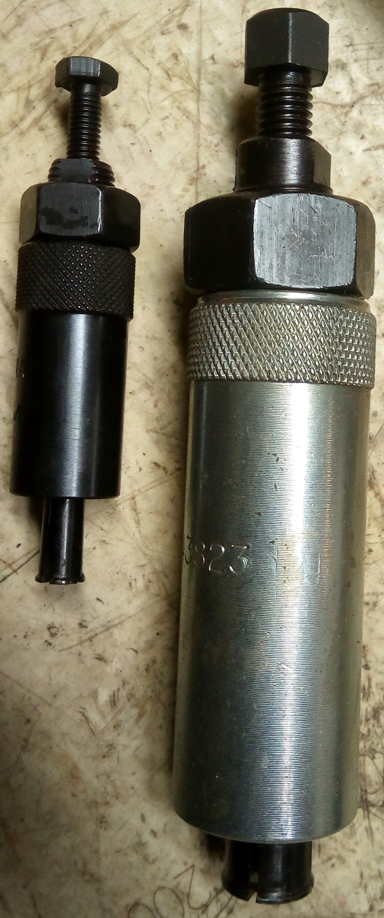 Due estrattori da interni di calibro differente